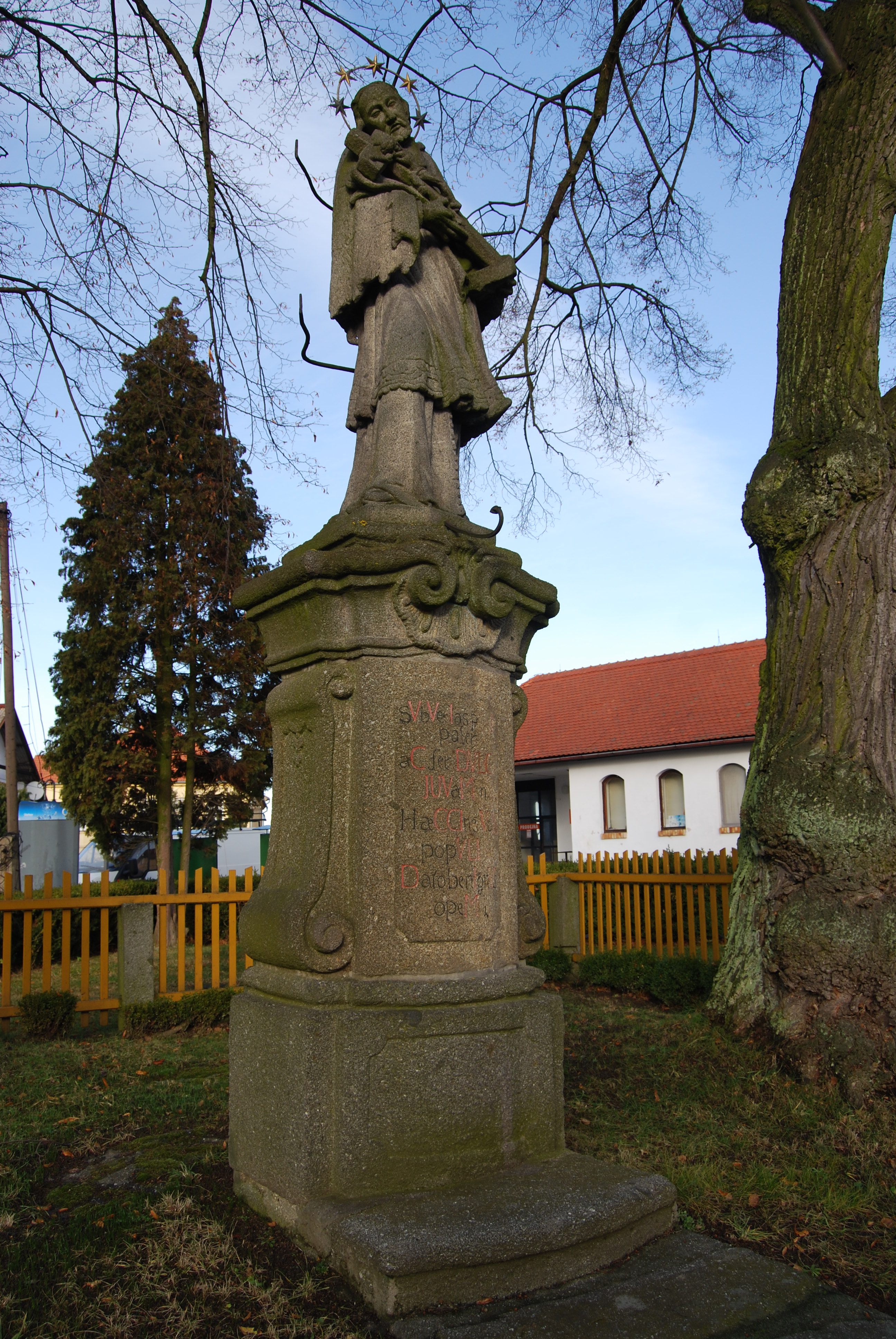 Socha sv. Jana Nepomuckého. Vysoký Chlumec. Okres Příbram. Česká republika.